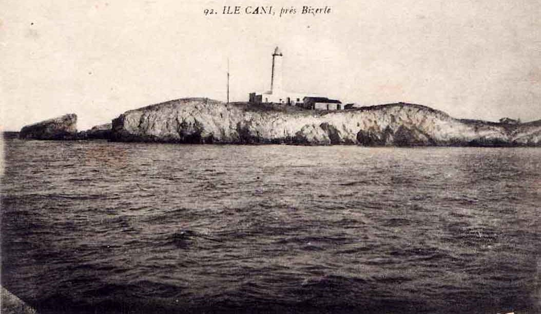 L'ile Cani et le phare Bertrand Bouret Collection particulière